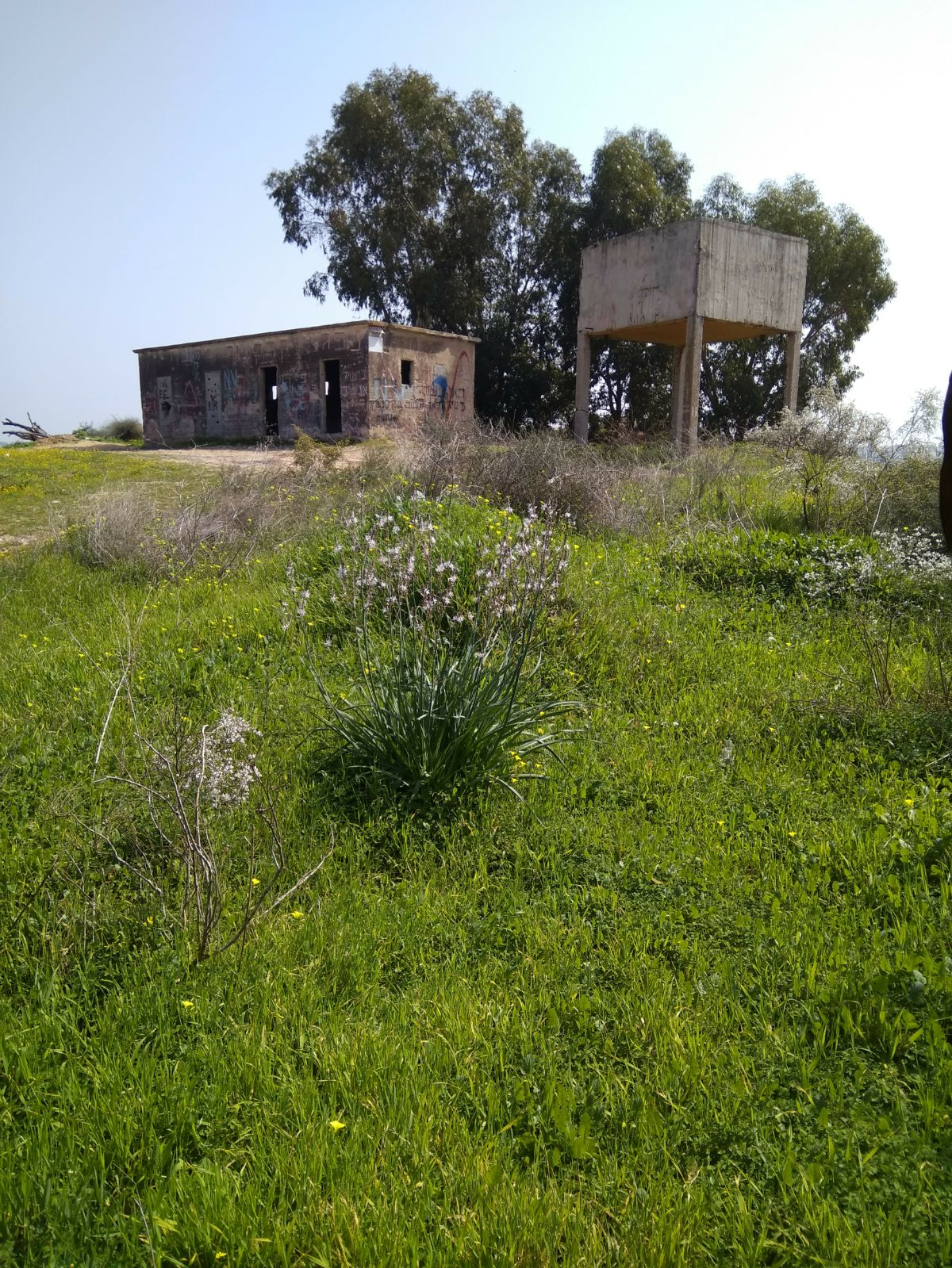 נוף המקום בו היה קיבוץ שבילים